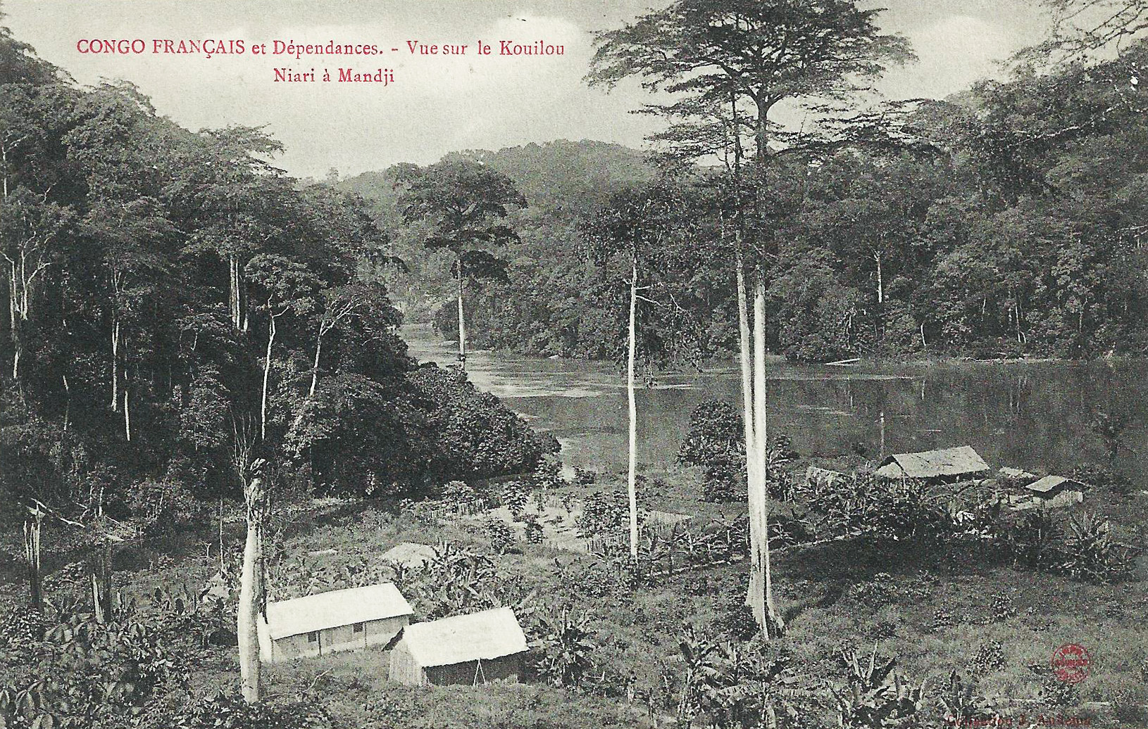 Vue sur le Kouilou-Niari à Mandji Collection J. Audema. Phot. A.B. & Cie, Nancy [Albert Bergeret] Congo Français